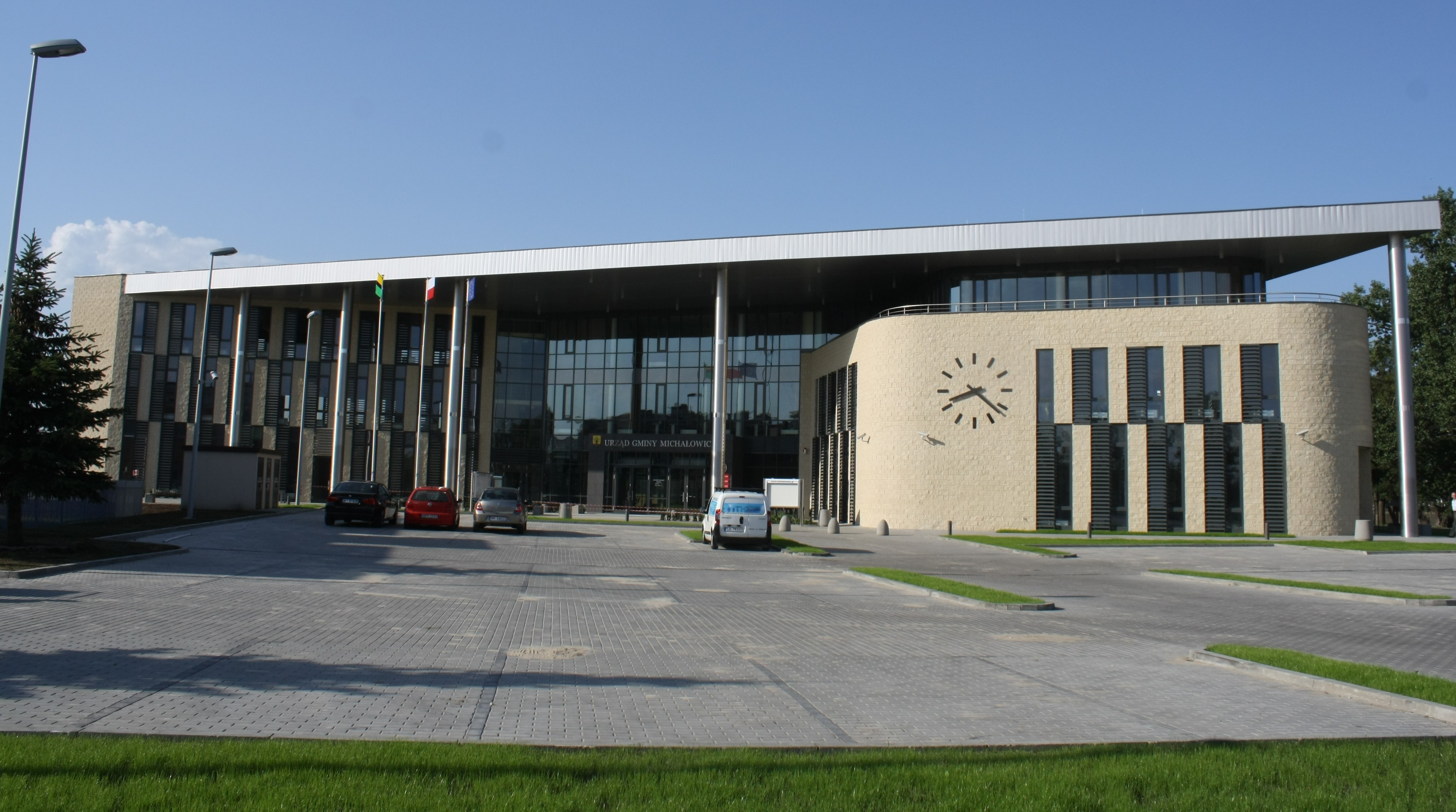 Nowa siedziba Urzędu Gminy Michałowice w Regułach